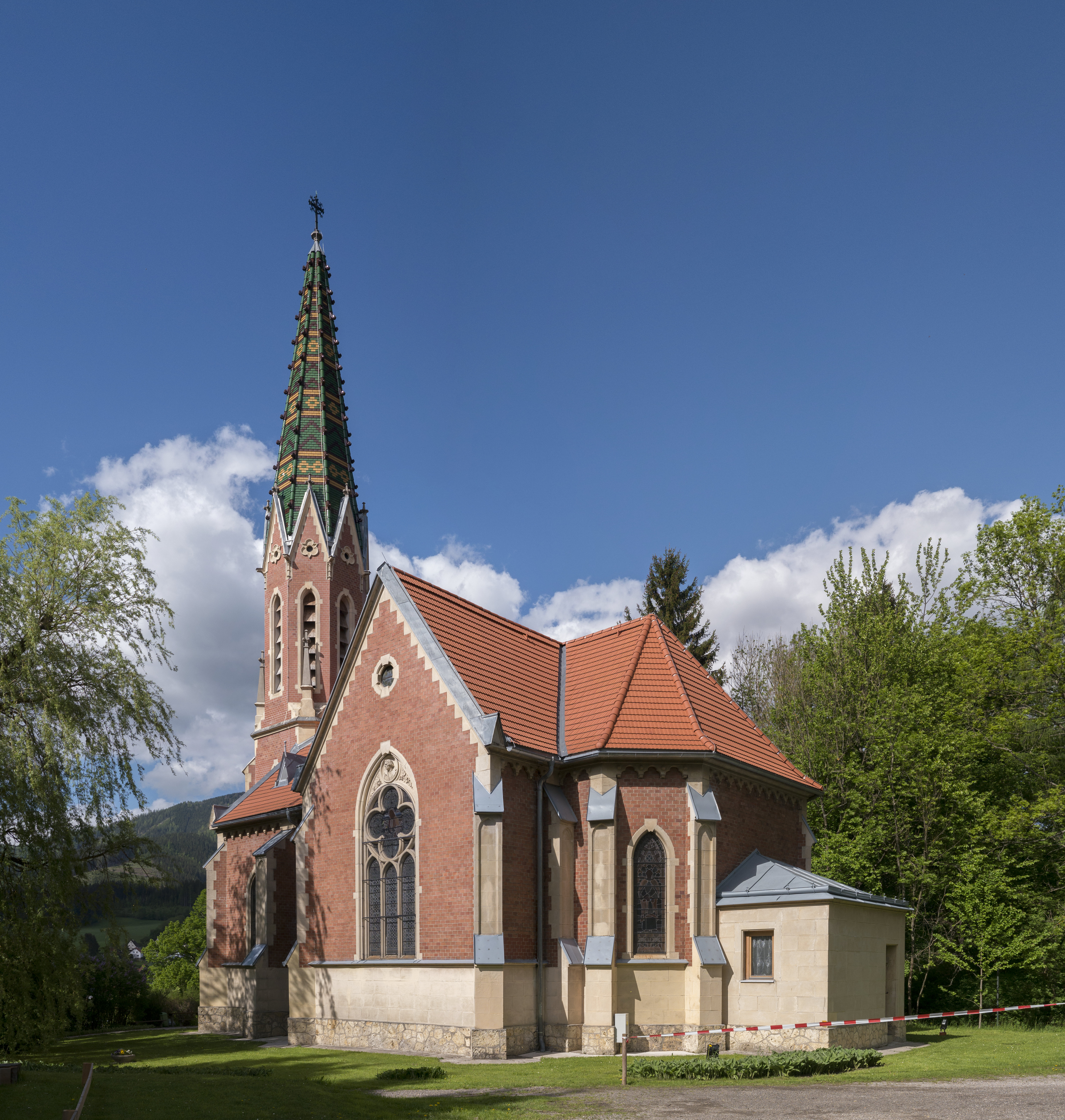 Evang. Pfarrkirche A.B., Heilandskirche